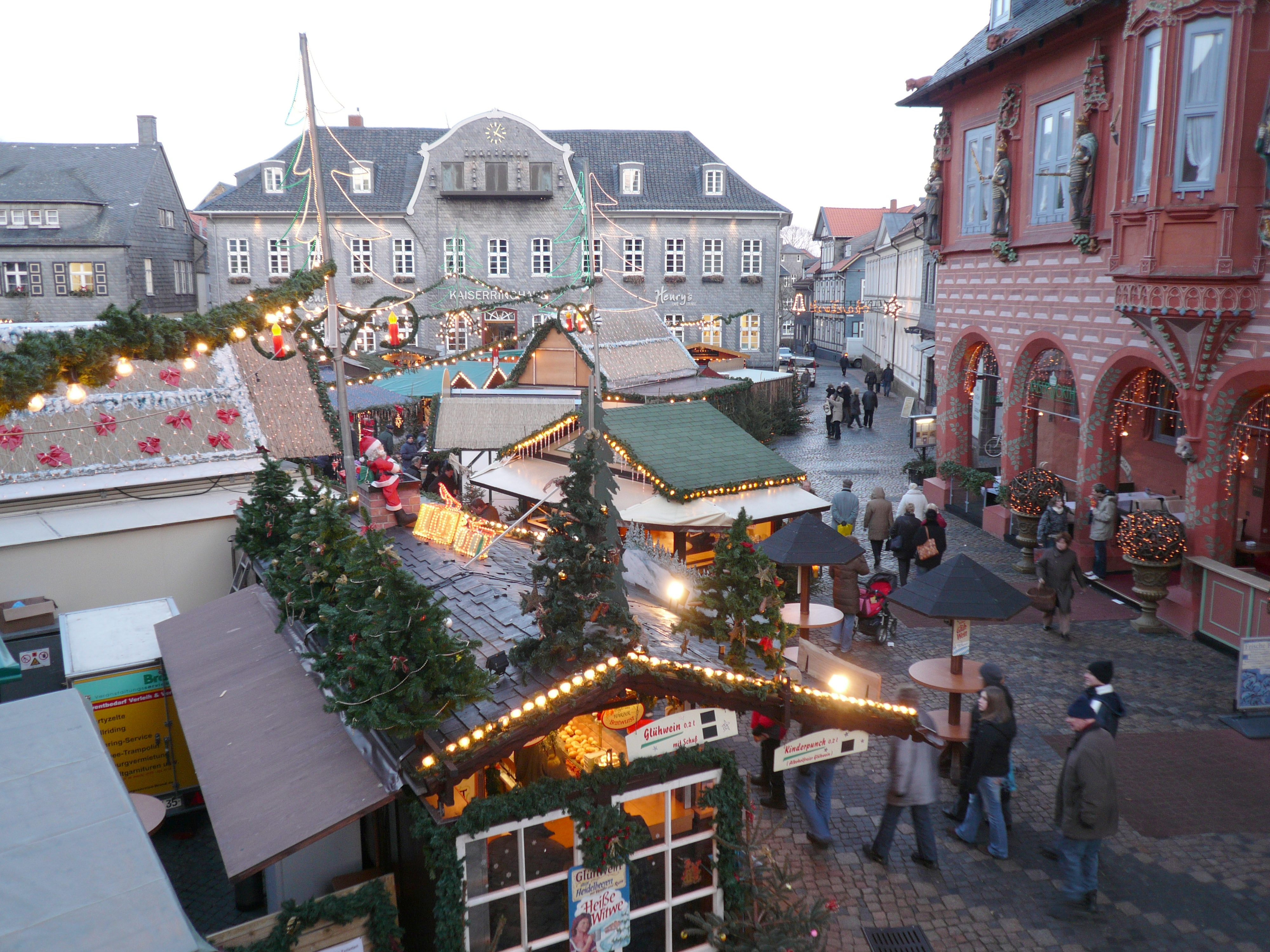 Christmas market at Goslar